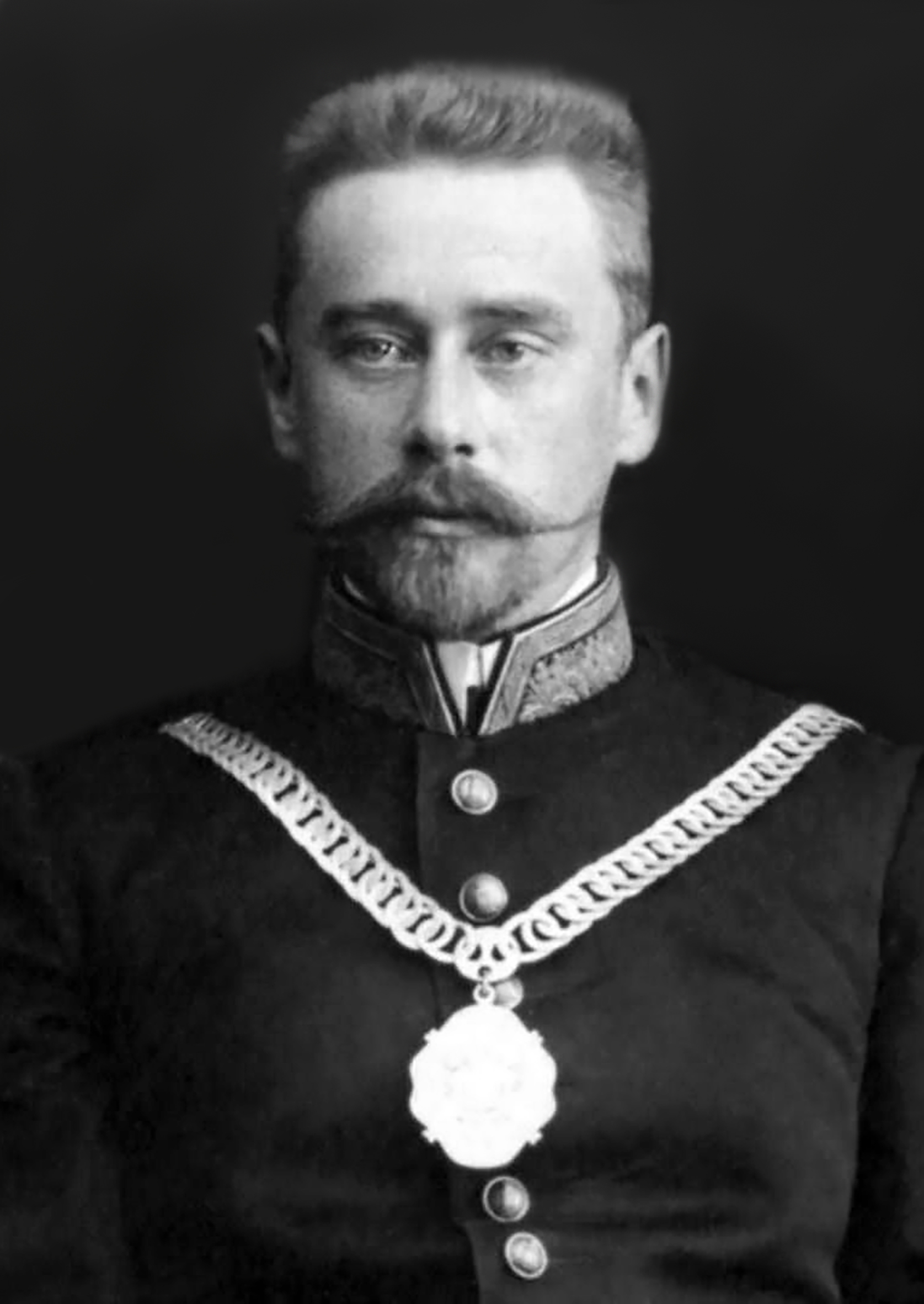 Глава города Осташков (1909-1916)